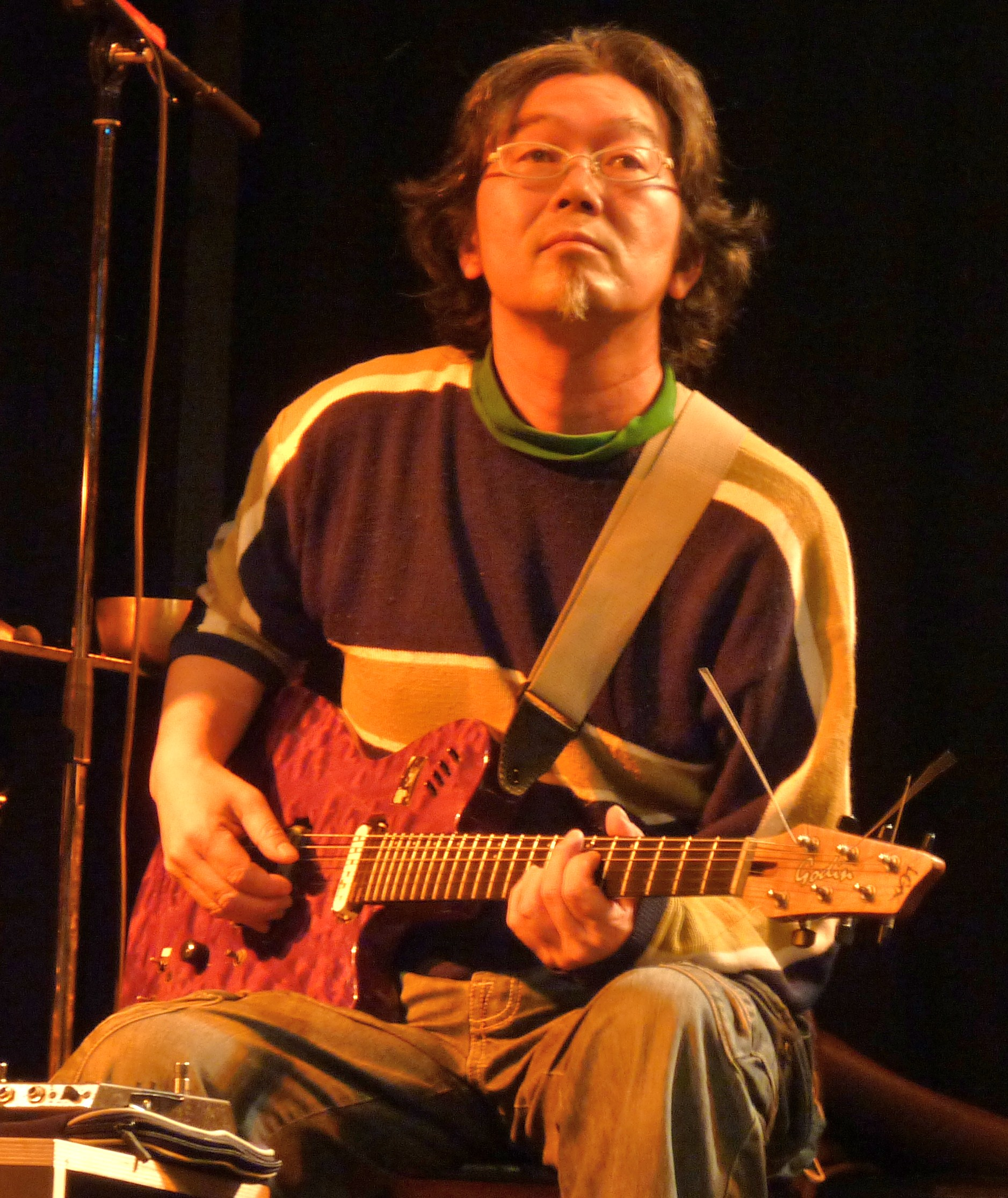 Kazuhisa Uchihashi, 2009